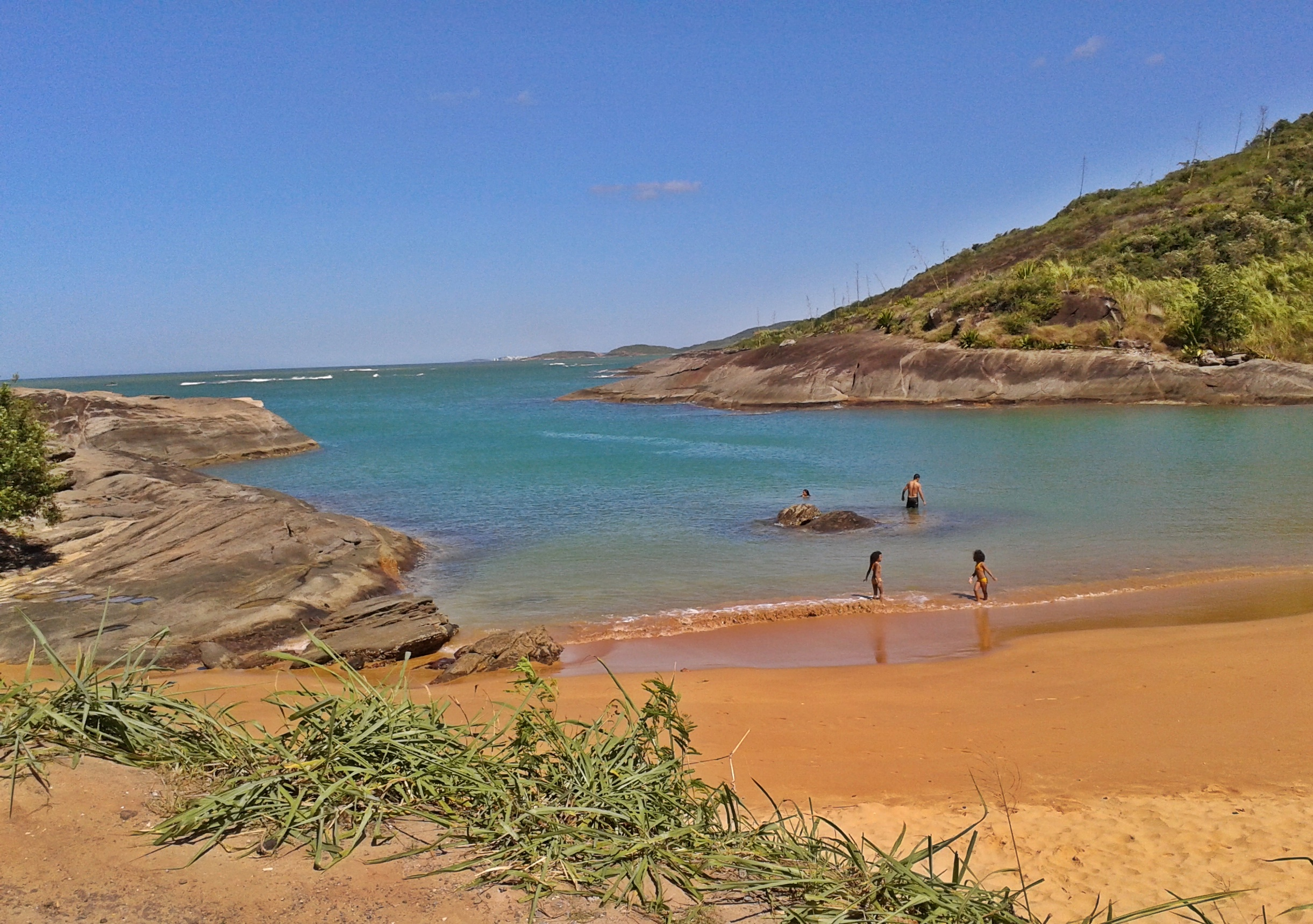 Prainha localizada em frente ao Camping Clube do Brasil, de Setiba.